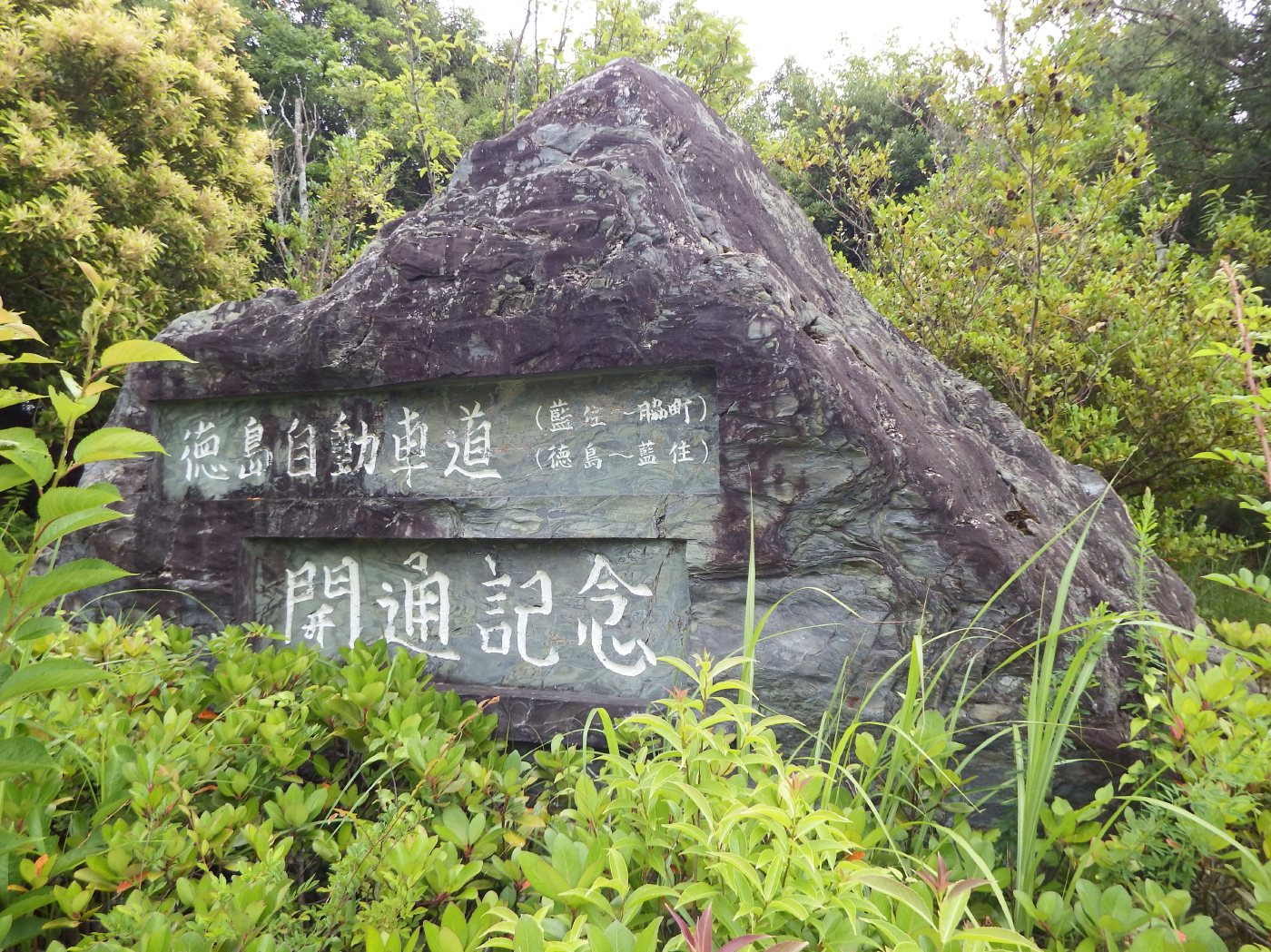 上板サービスエリアの徳島自動車道の開通記念碑